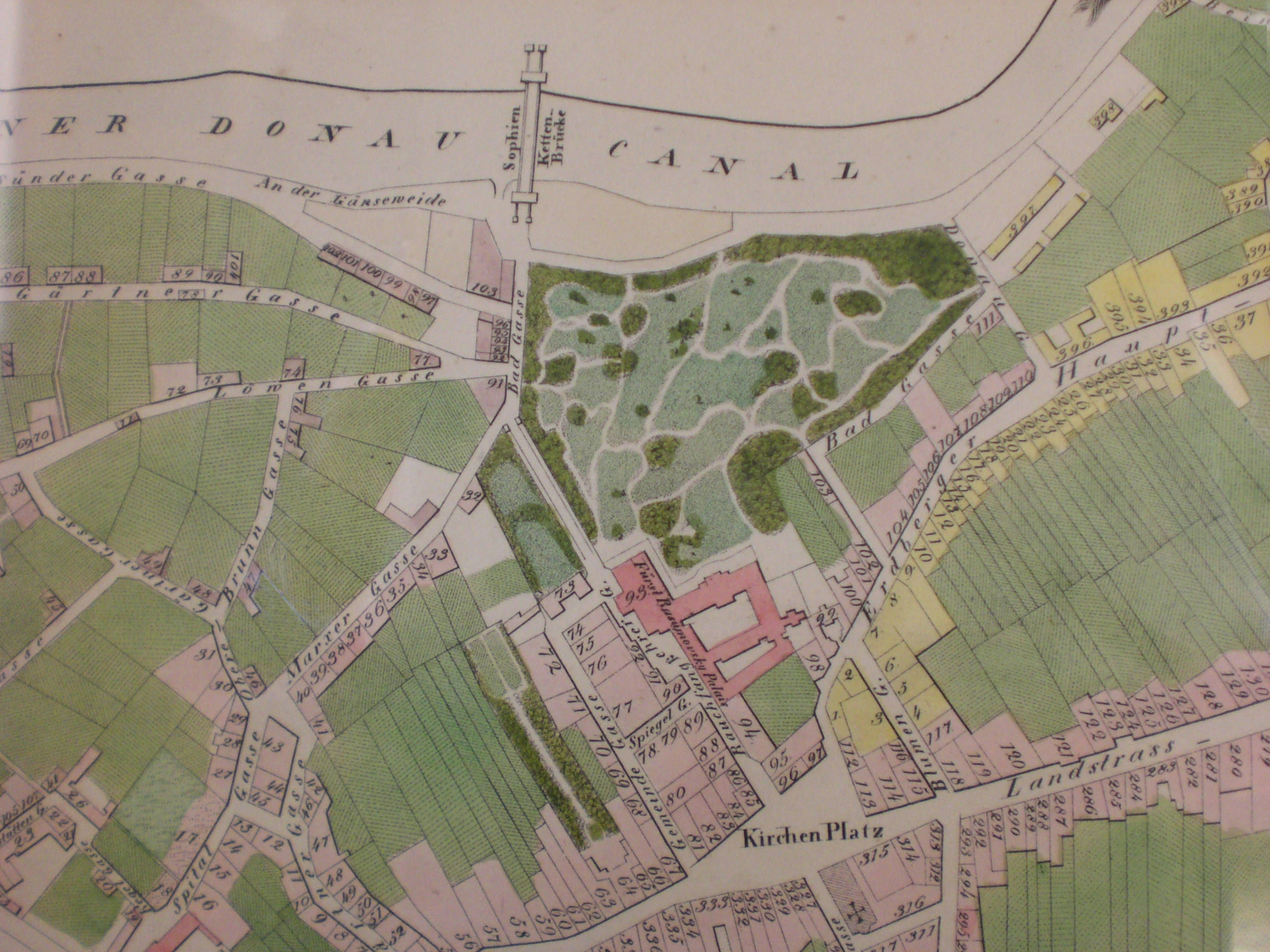 Palais Rasumofsky, Ausschnitt aus der Karte des “Kais. Königl. Polizey=Bezirk Landstraße” von Carl Graf Vasquez (ca. 1835)